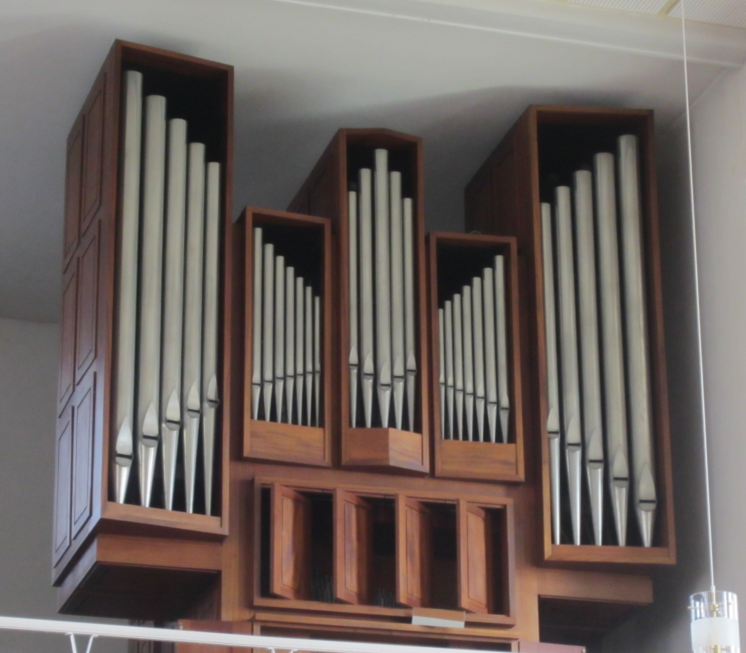 Frontansicht Hillebrand-Orgel Maria Königin Seesen 08/2015